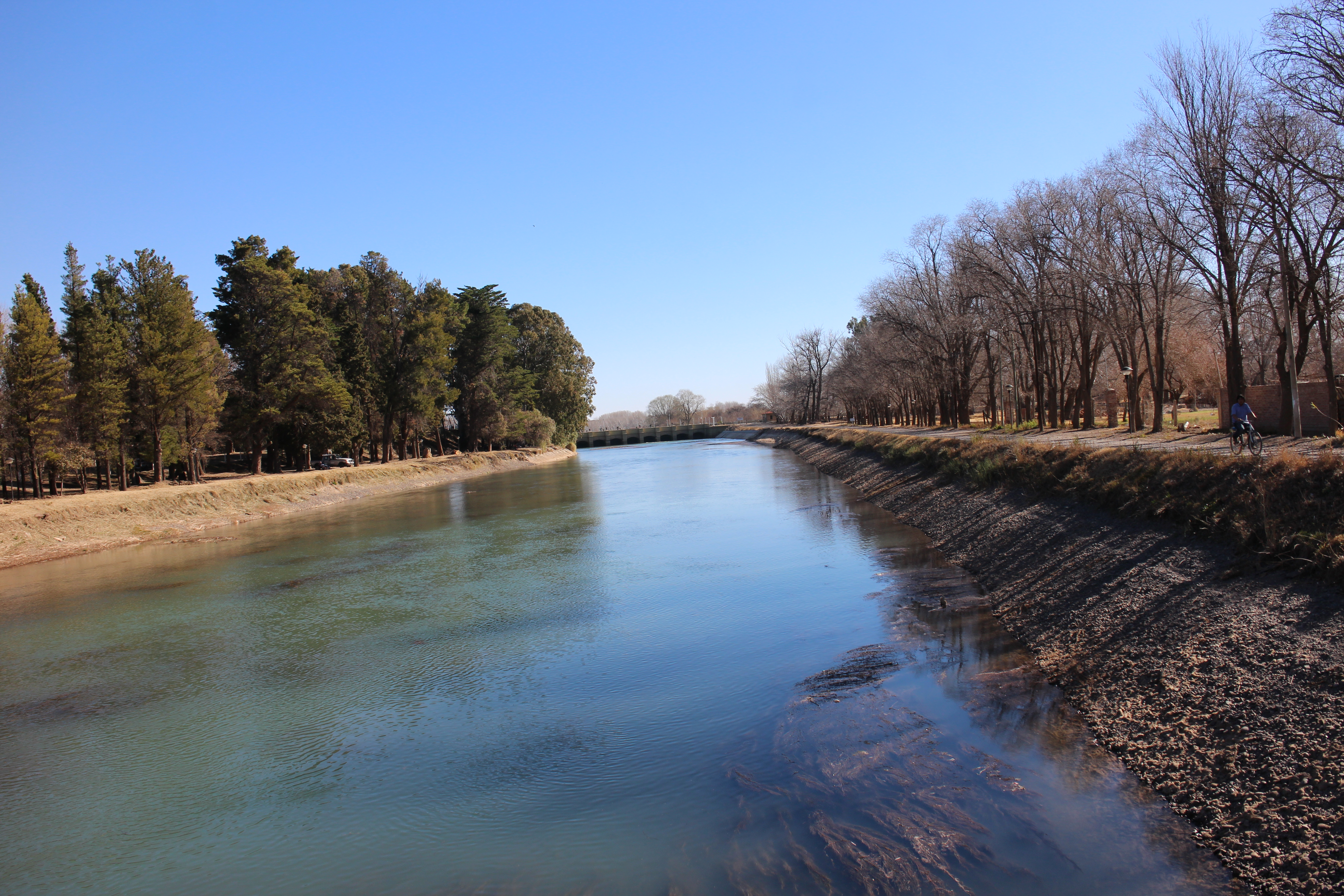 canal principal de riego - barda del medio